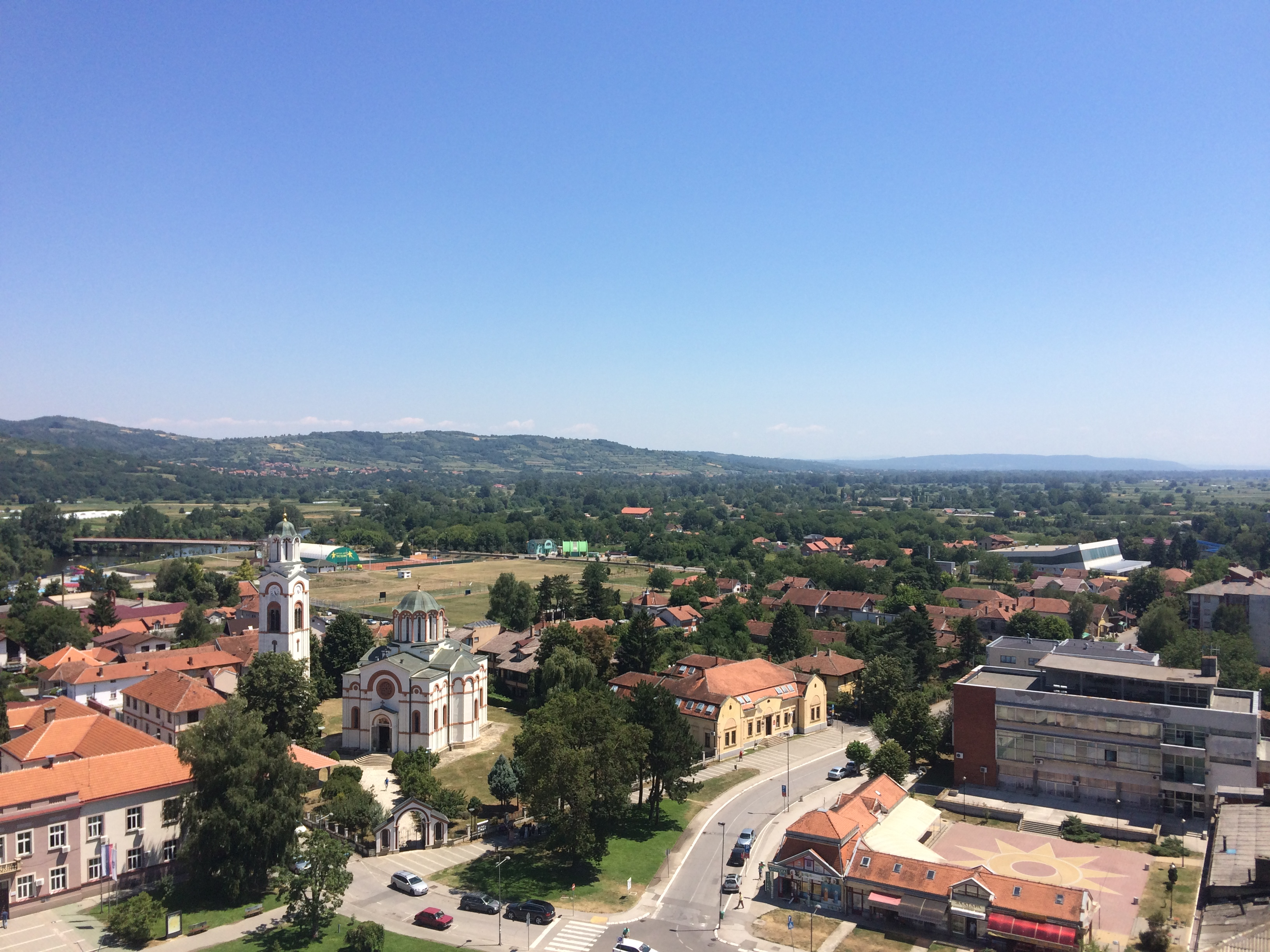 Panorama Trstenika